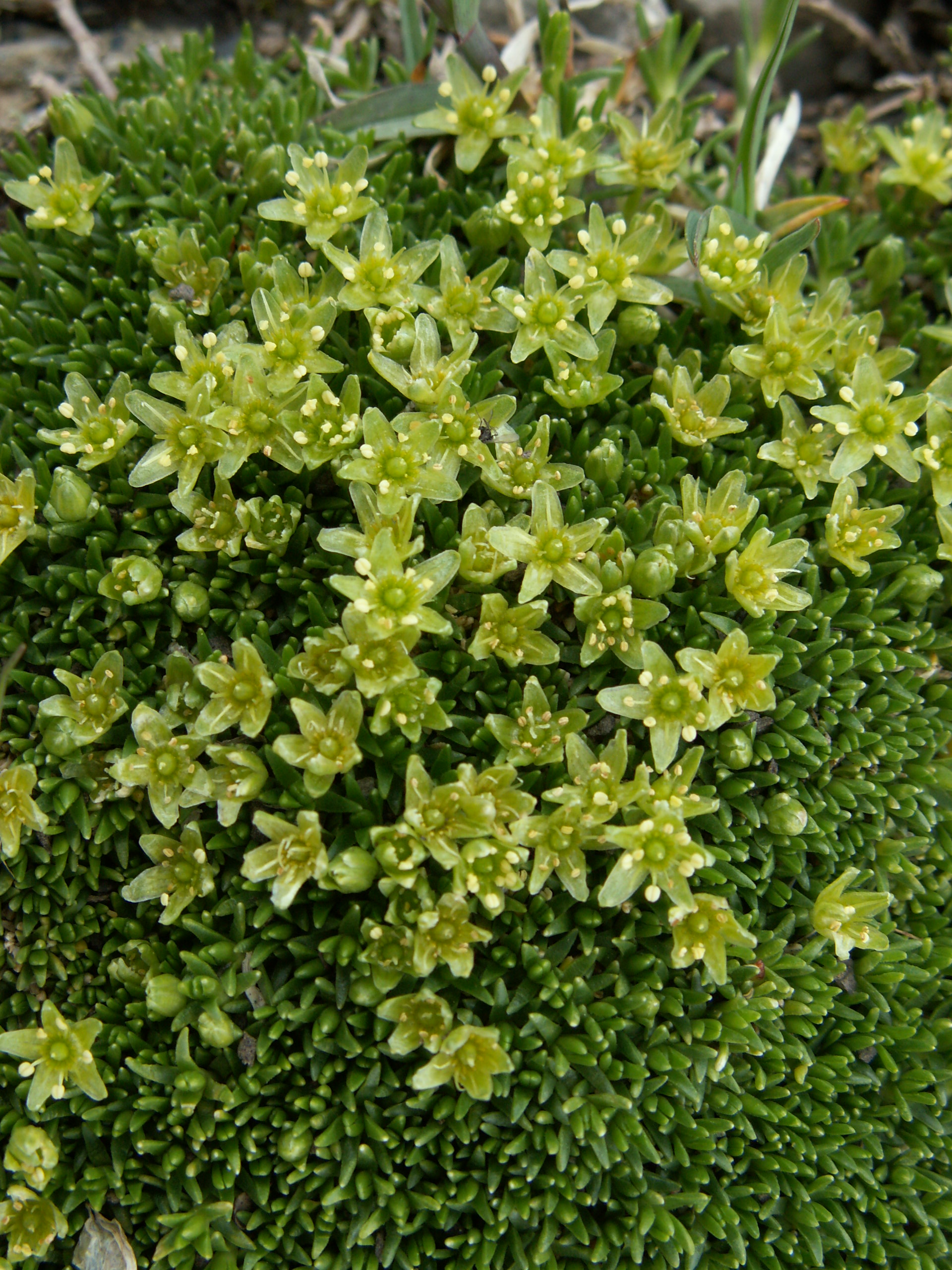 Minuartia sedoides, Schynige Platte, Kanton Bern, Schweiz